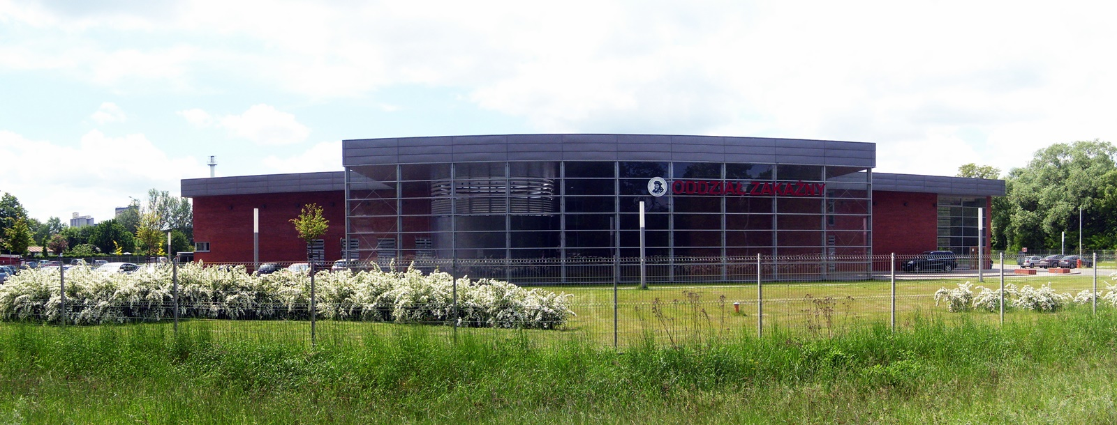 Wielospecjalistyczny Szpital Miejski im. J. Strusia w Poznaniu, Oddział Zakaźny przy ul. Żelaznej 2, widok od ul. W. Dymka